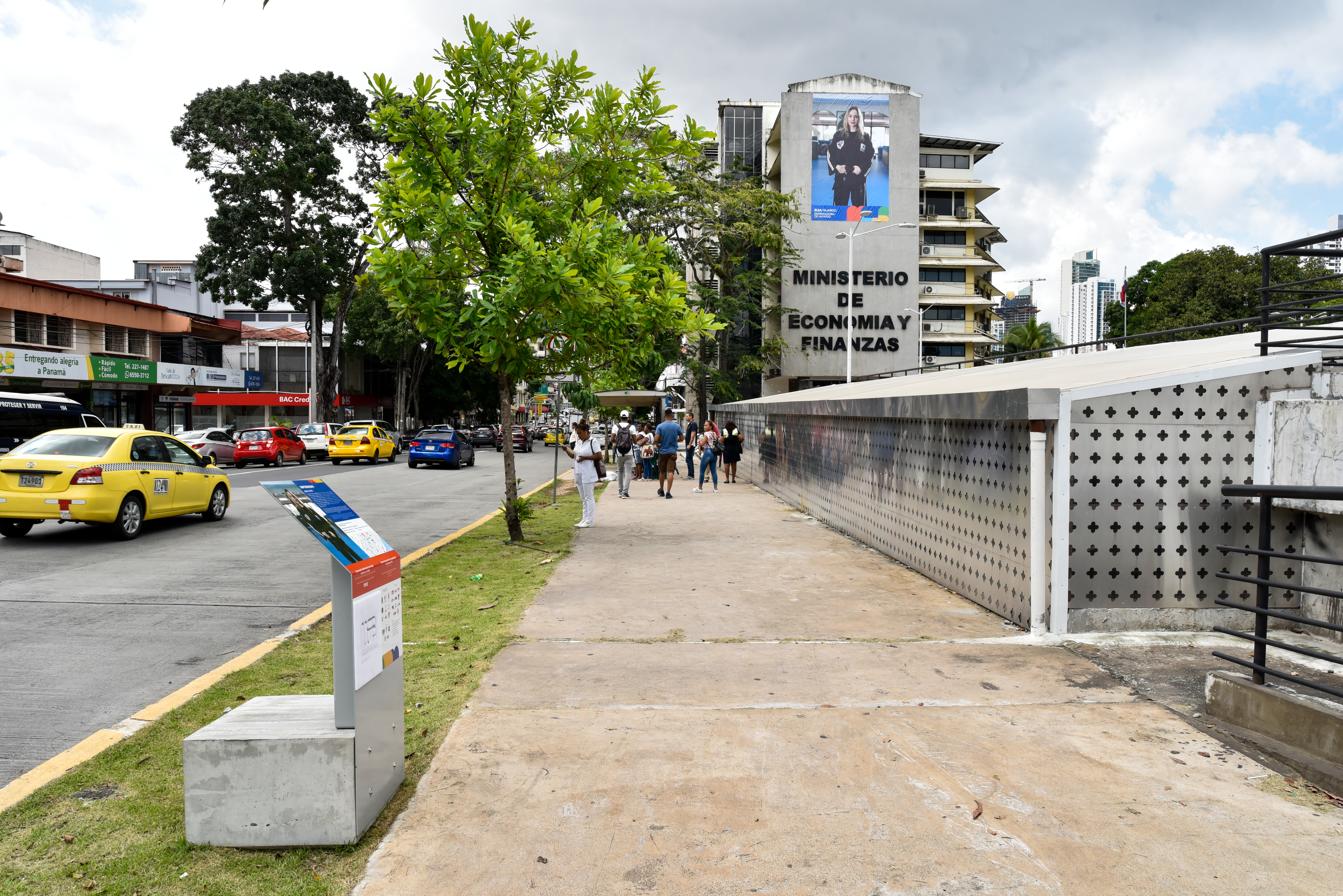 Museo de la ciudad - exhibicion Empoderadas. 5 gigantografías en el corregimiento de Calidonia de mujeres en oficios considerados no convencionales para su género. El Museo de la Ciudad es un proyecto de la Comisión 500 Años de Fundación de la Ciudad de Panamá. Elsa Fajardo, modelo y entranadora de Hapkido, en el edificio del Ministerio de Economía y Finanzas.